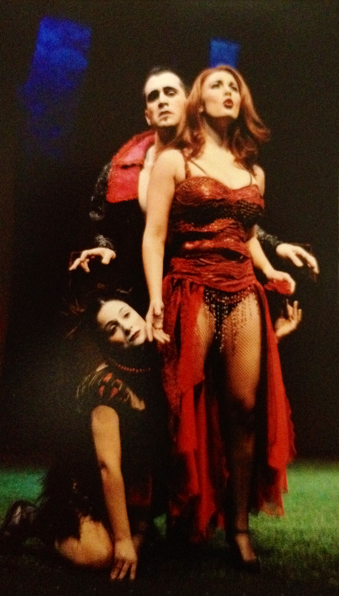 ההצגה חלום של לילה בליל קיץ, בבימויו של גלעד קמחי, עיצוב תלבושות אולה שבצוב, עיצוב תפאורה ערן עצמון, עיצוב תאורה יחיאל אורגל, בית ליסין, 2009